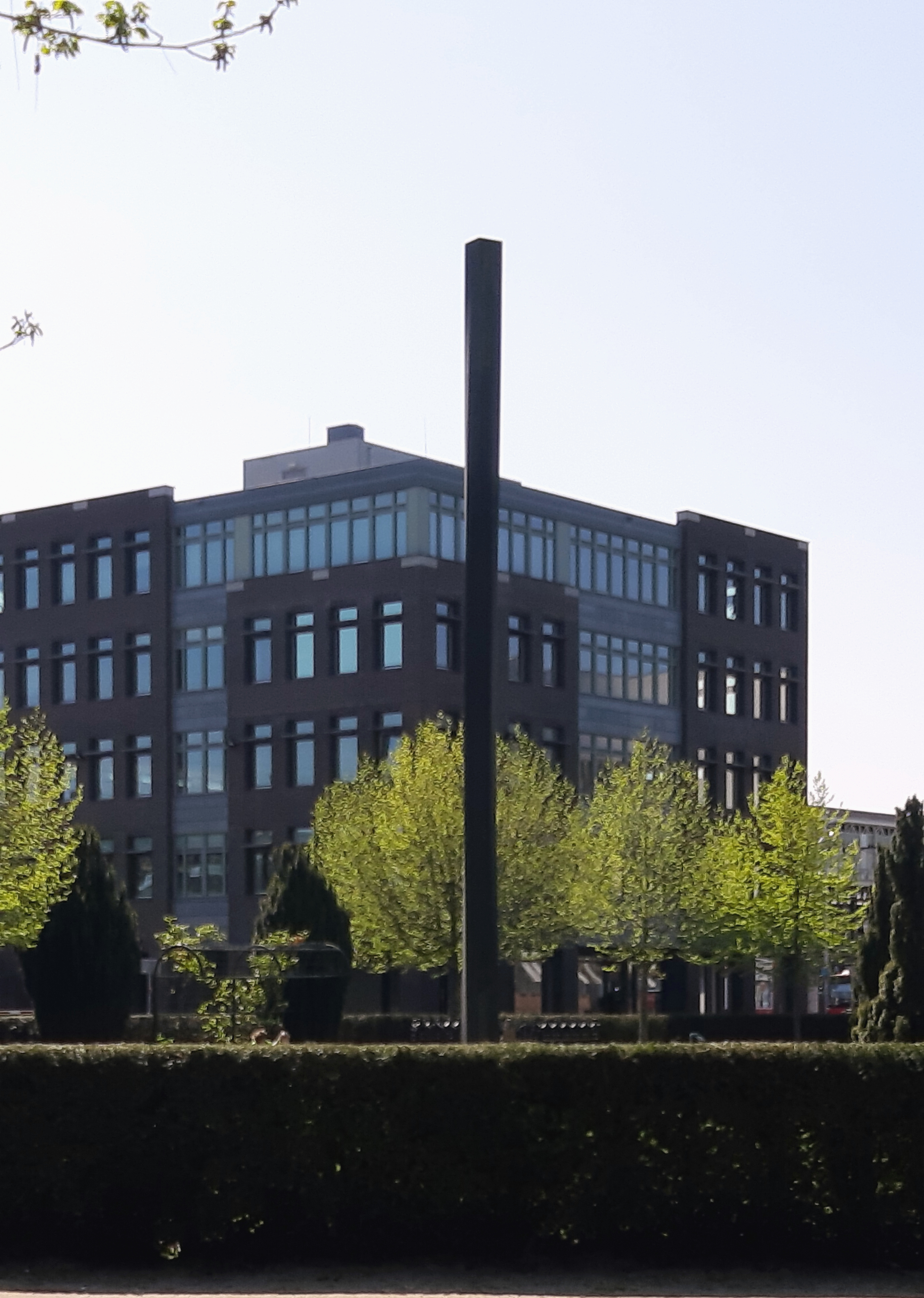 Zonder Titel door Evert Strobos (1975) in het Prins Bernhardplantsoen